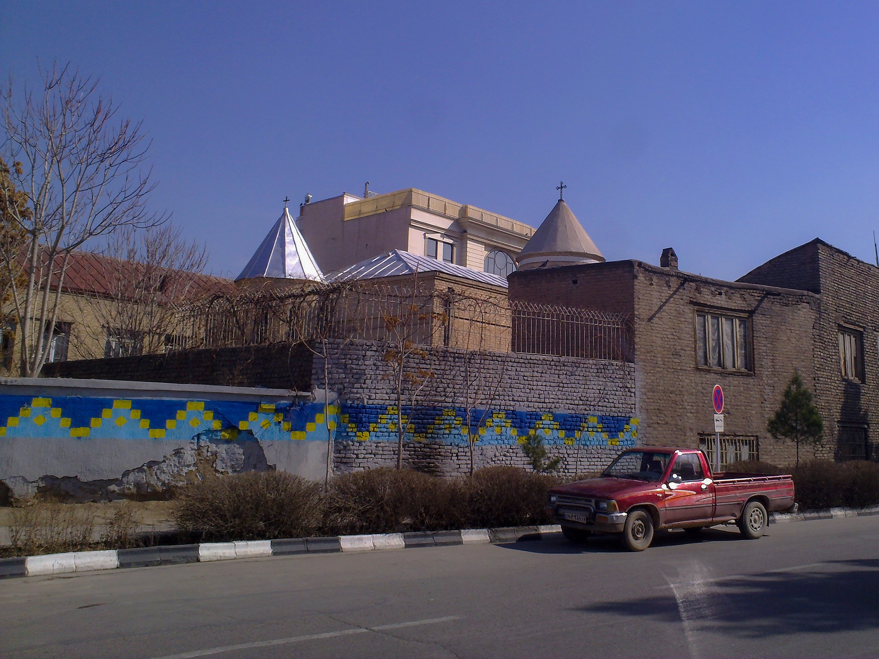 کلیسای مسروپ مقدس مربوط به دوره پهلوی است و در «میدان دهم دی» شهر مشهد واقع است. این کلیسا در سال ۱۹۴۱ میلادی توسط ارمنی‌های ساکن همان شهر بنا گردیده است. پلان کلیسا بازیلیکا ستوندار بشکل مستطیل در جهت شرق به غرب است که محراب آن در قسمت شرقی قرار دارد. بر روی دیوارهای شمالی و جنوبی نورگیرهایی دارد. بنای کلیسا دارای زیرزمینی است با دریچه‌های متعدد به سمت خارج که به منظور جلوگیری از نفوذ رطوبت به داخل ساختمان بنا شده است و به همین علت نیز کف کلیسا از سطح محوطه اطراف آن مرتفع تر می‌باشد و جهت ورود به داخل کلیسا پلکانهایی در جلوی ورودی غربی تعبیه شده است. برج ناقوسخانه بالای این پله‌ها قرار دارد. سقف کلیسا به جز در قسمت محراب که بالای آن گنبد با نورگیرهای متعددی تعبیه شده است با شیروانی پوشانده شده است. در اطراف کلیسا ساختمان‌های اداری و مدرسه ارمنی‌های مشهد قرار دارد.